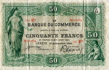 Svájc, Banque de Commerce, Genéve 50 frank 1898.